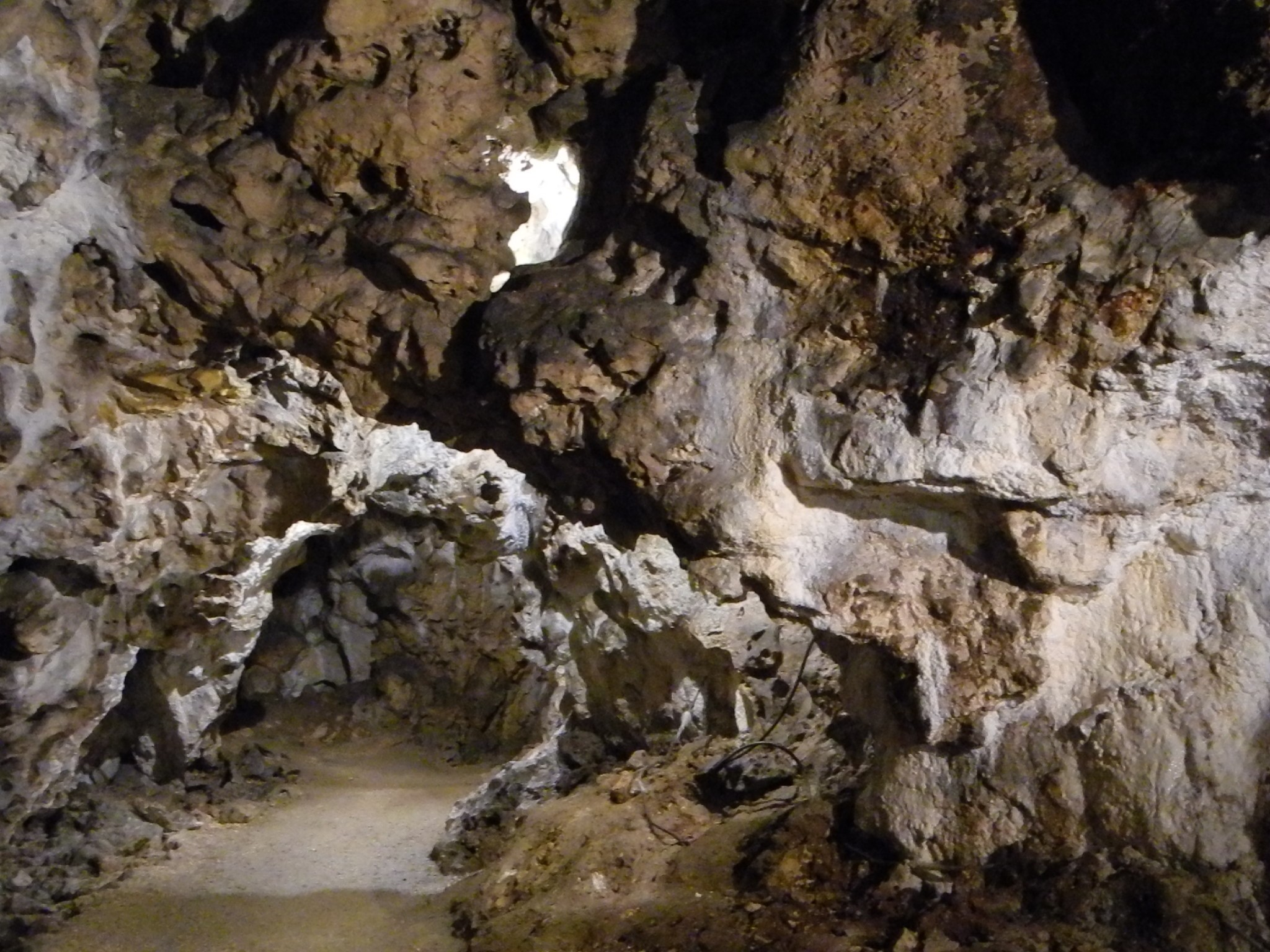 Schelklingen - Hohler Fels, innen03